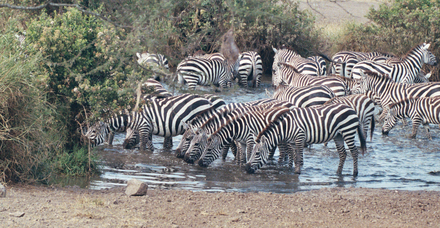 Zebras, Serengeti National Park, Tanzania